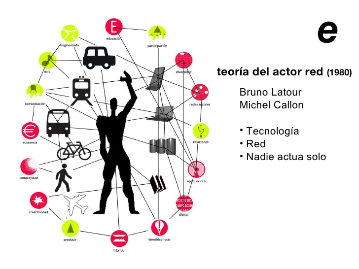 Dibuix il·lustratiu xarxa (teoria de l'actor-xarxa)